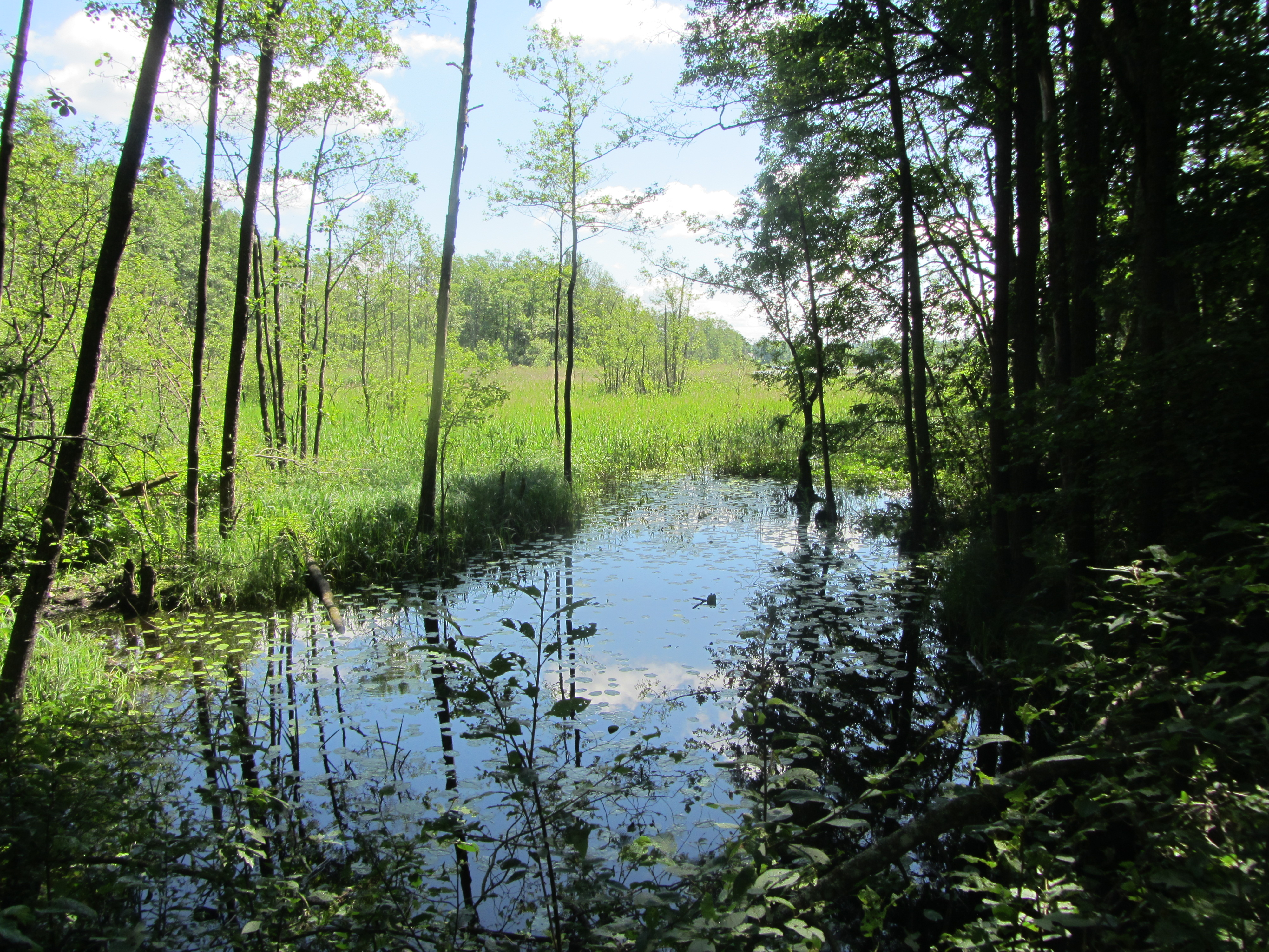 Suvieko sen., Lithuania